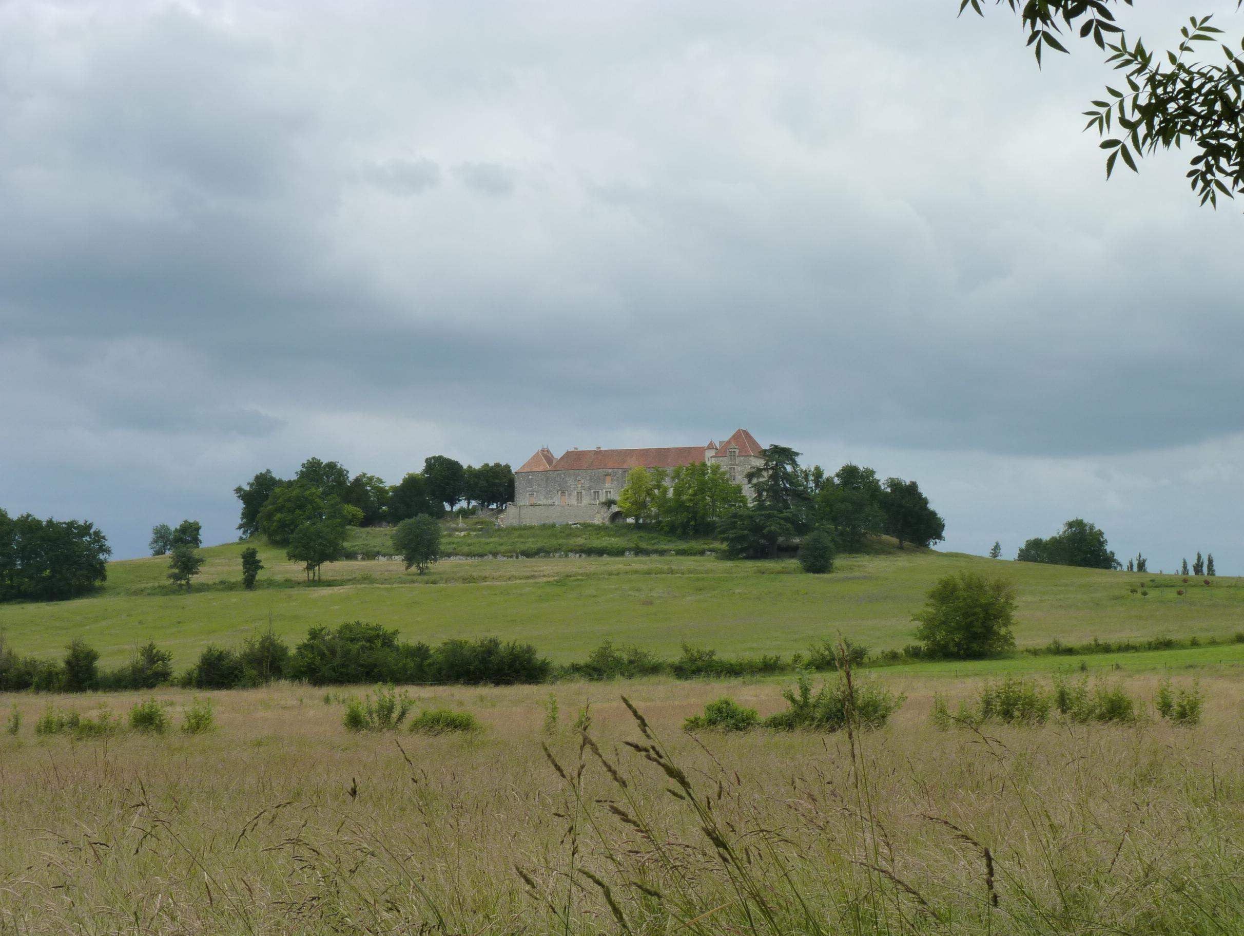 Château de Théobon, village de Loubès-Bernac, département du Lot-et-Garonne - Sur la butte